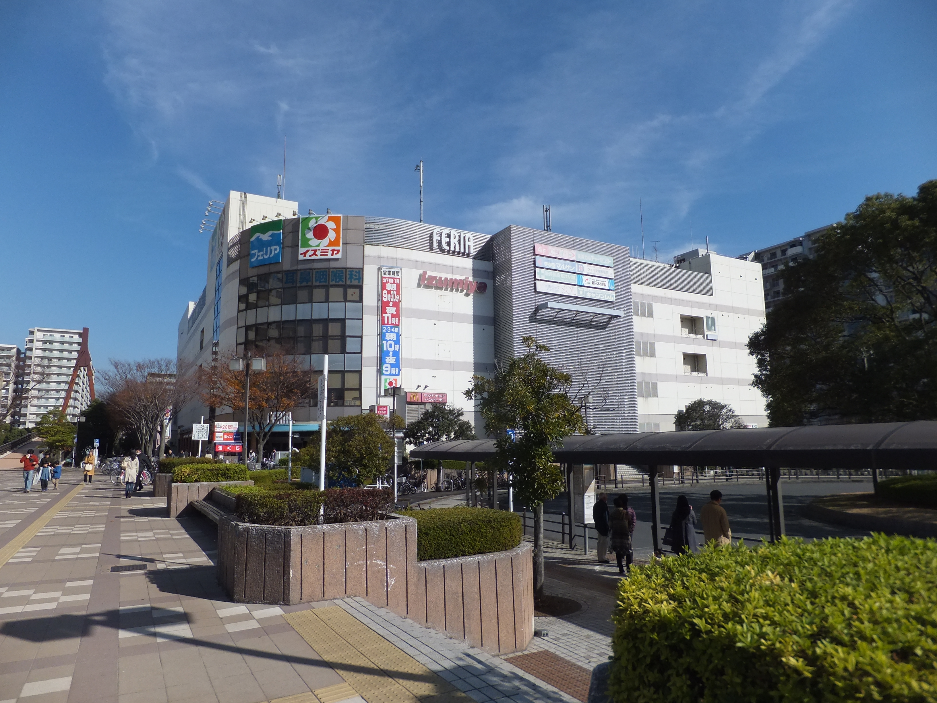 検見川浜ベイサイドモール フェリア（千葉市美浜区）